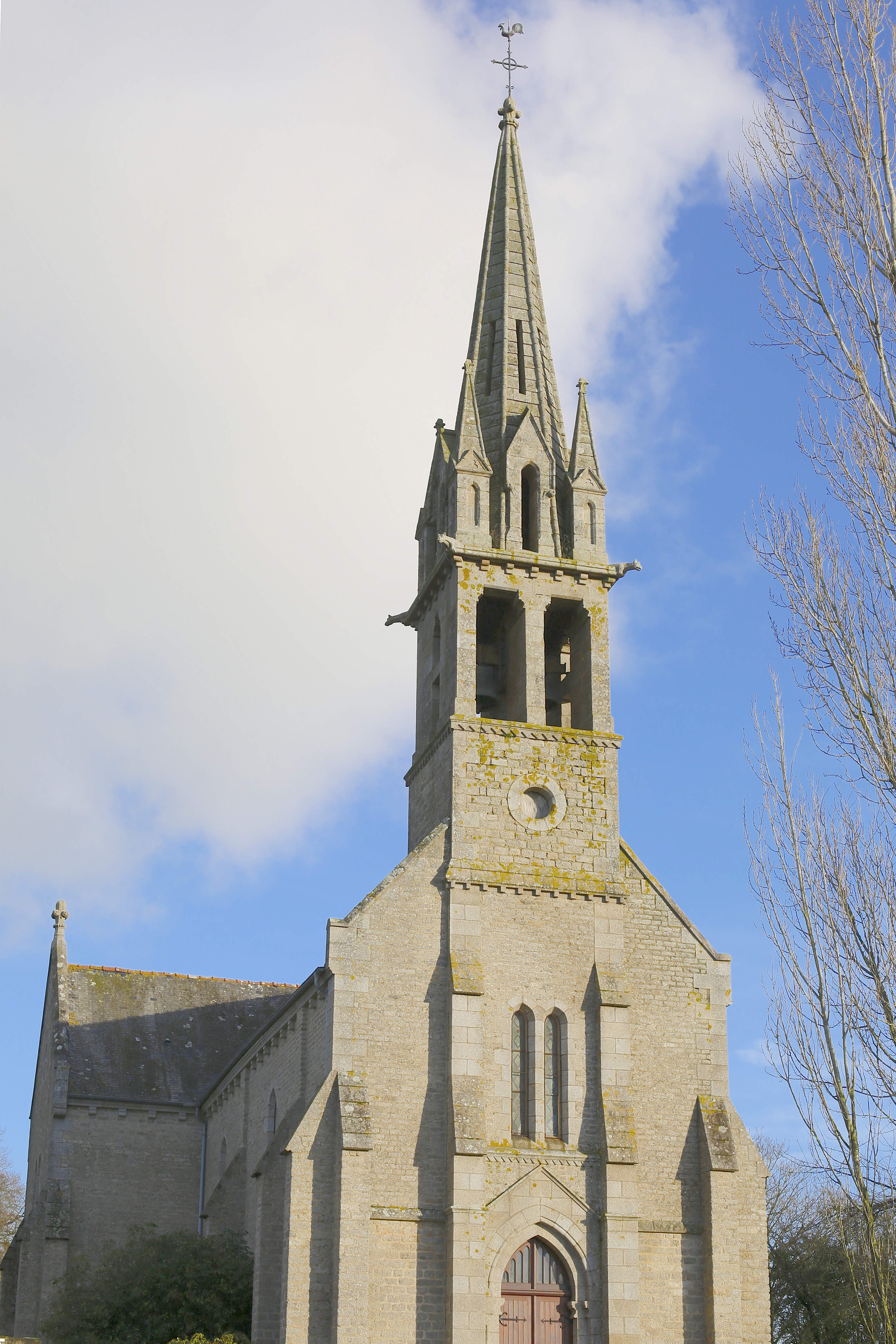 L'église Notre-Dame-de-Pitié de La Chapelle-Blanche.